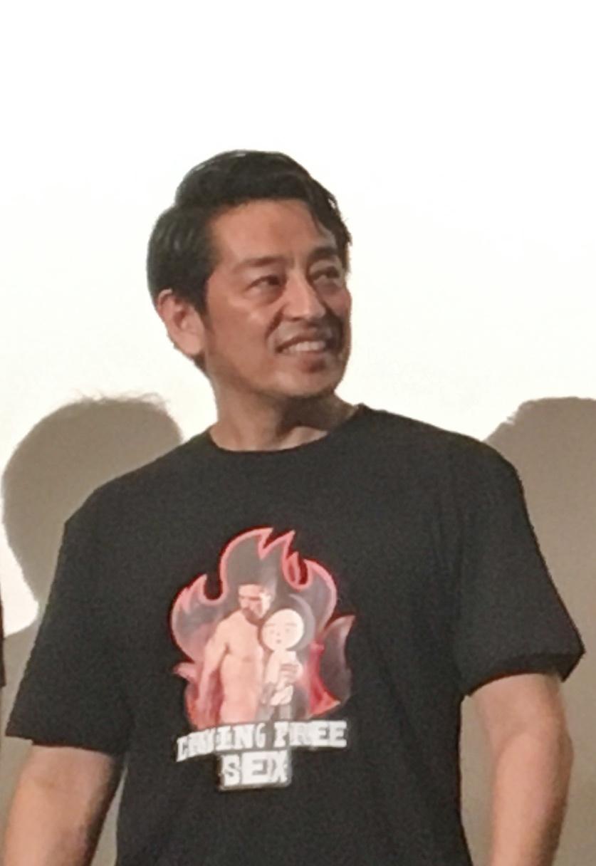 木村圭作（2018年8月9日、新宿K's cinema） クライングフリーセックス舞台挨拶にて